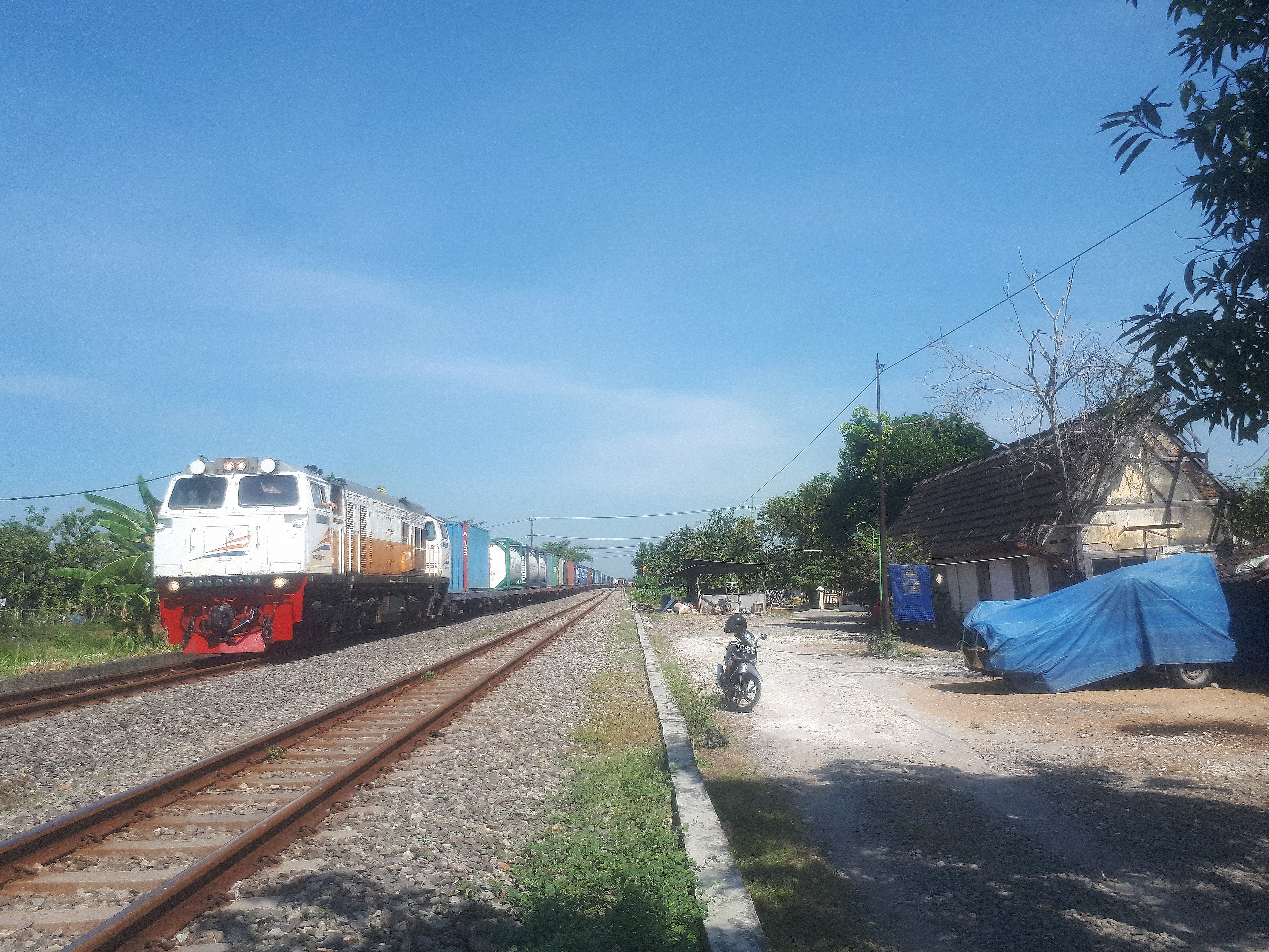 Kereta api Peti Kemas saat melintas di bekas emplasemen Halte Celangap, 2020